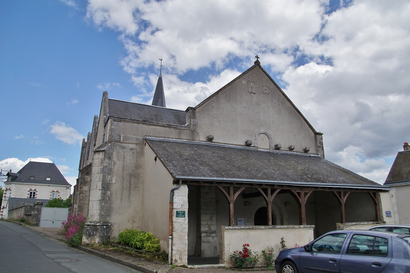 Loir et Cher